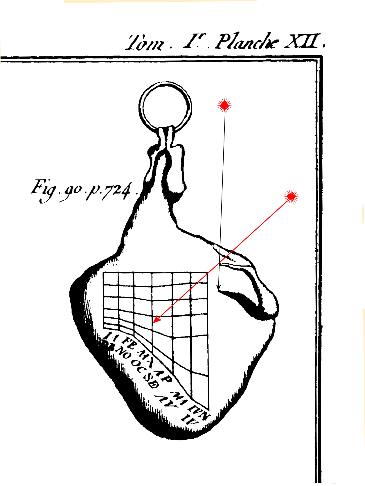 Vue "miroir" du cadran de Portici, à l'exception de l'indication des mois respectée pour lisibilité. En rouge, le jour de l'équinoxe de printemps, on peut lire ± 3,5 heures (ou 15,5 h) temporaires.